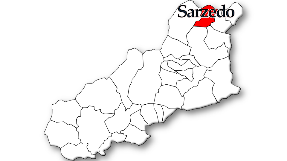 População